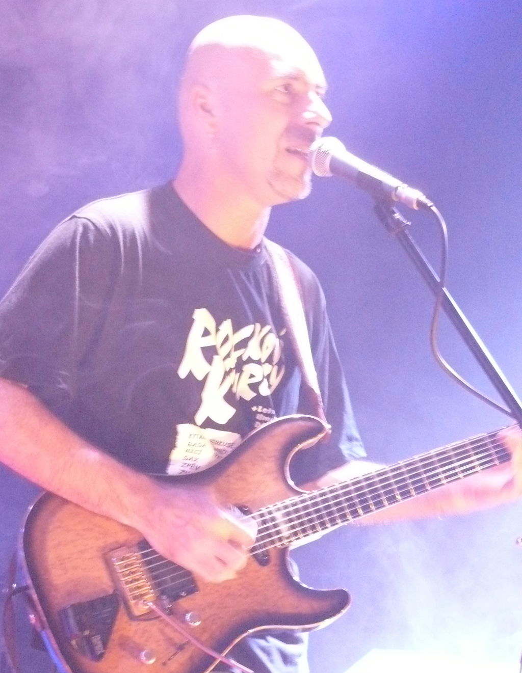 Jan Militký, vystoupení na Rockových kurzech 2012, Velké Losiny